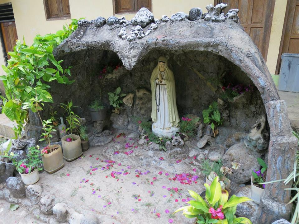 Remexio Vila